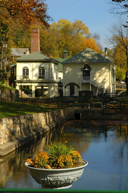 Buildings in Berkeley Springs State Park, Berkeley Springs, West Virginia, USA